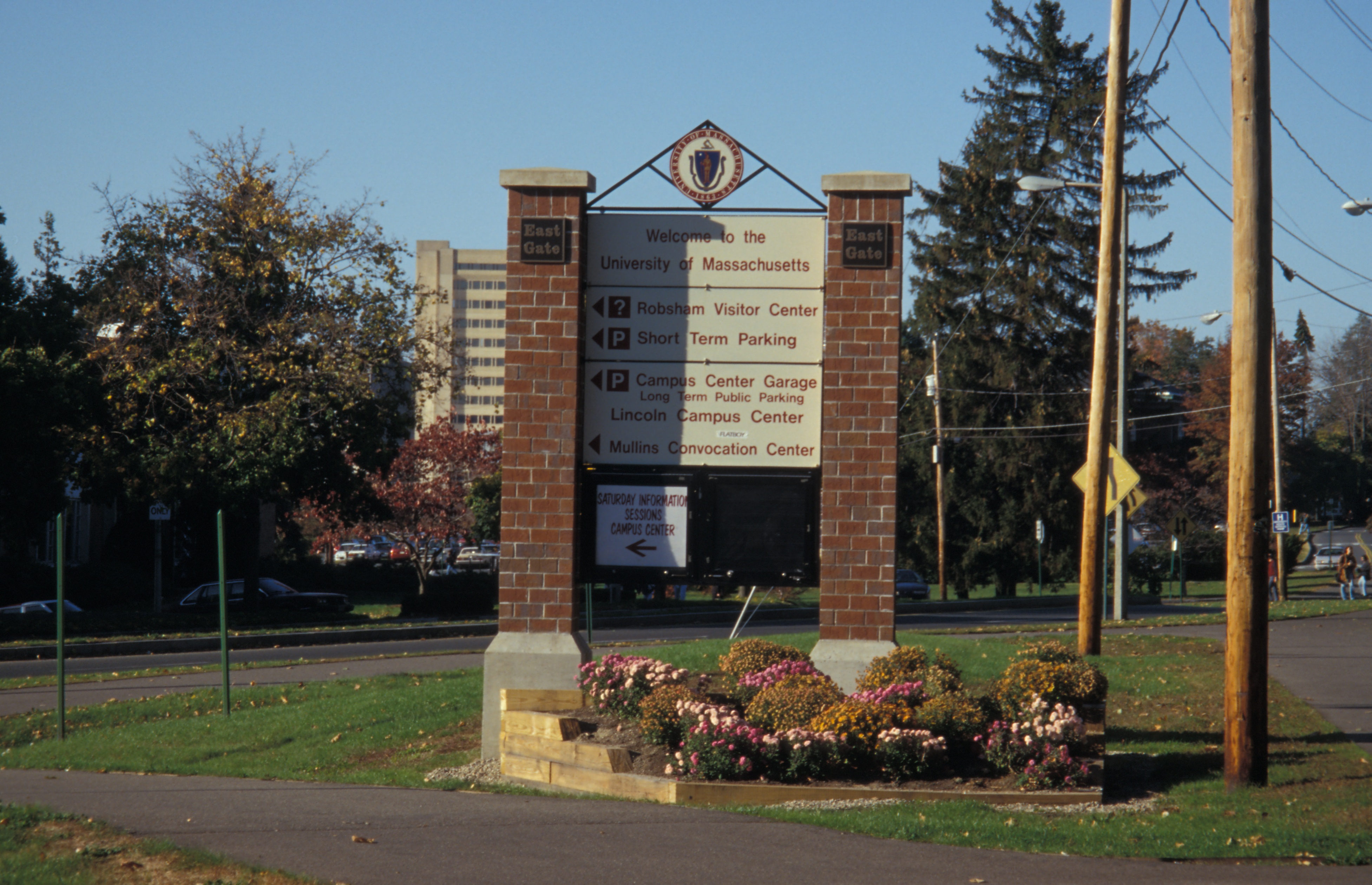 Welcome Sign UMass Amherst MA USA